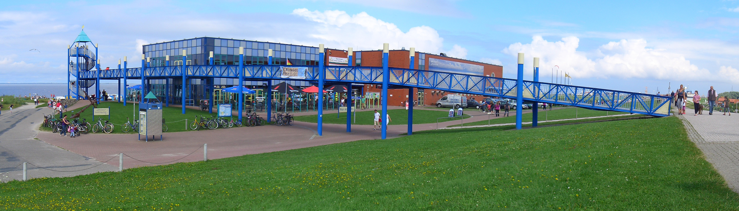 Haus des Gastes in Norden-Norddeich